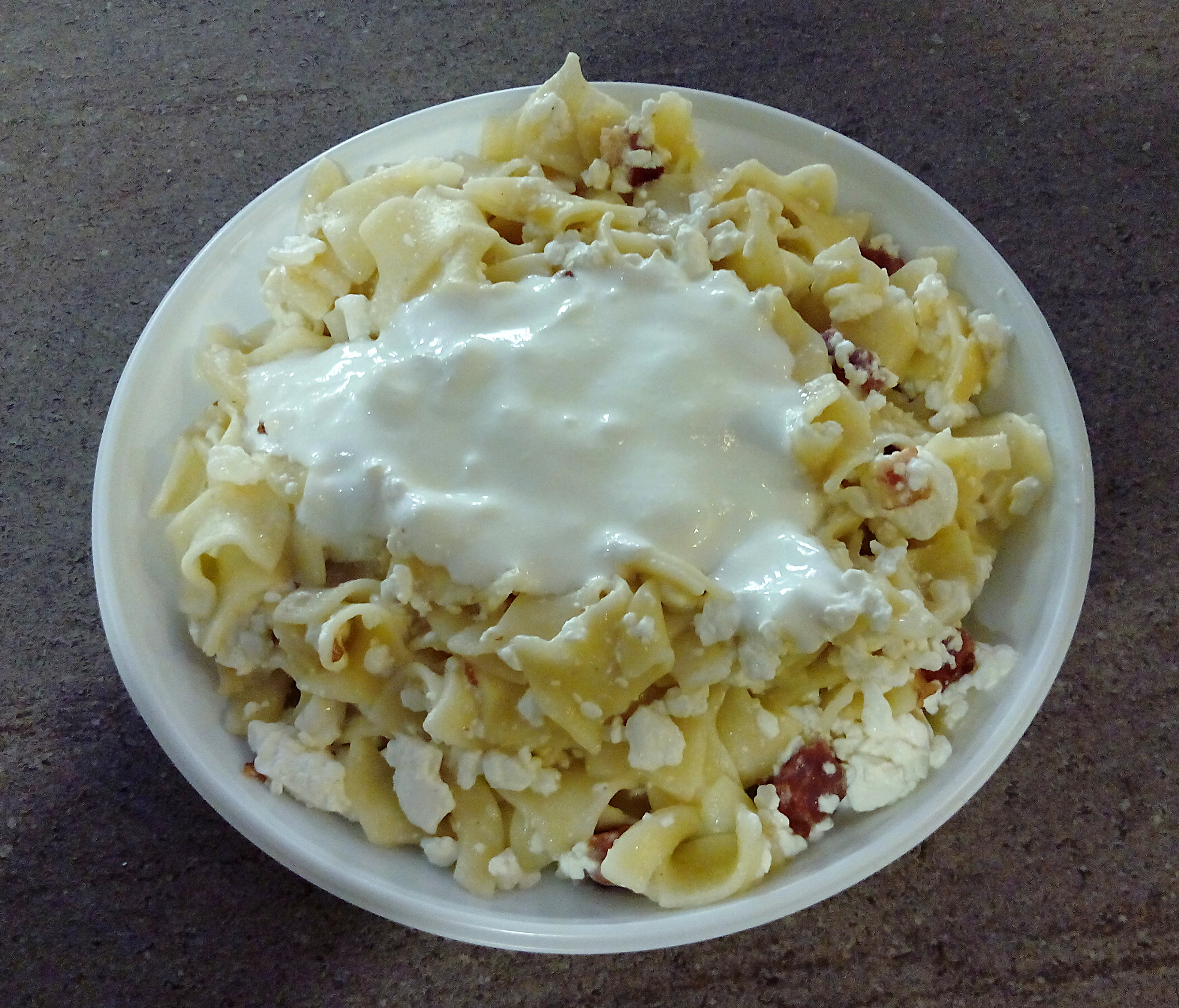 Budapest, Lukács fürdő, wellness büfé, túróstészta